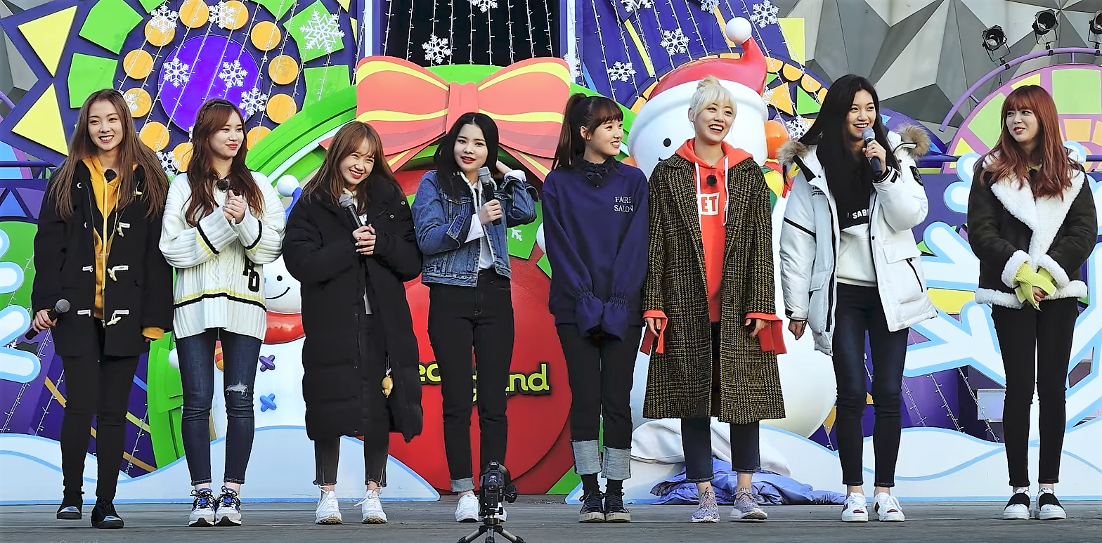 171202 위키미키 ( 토크 ) - 서울랜드 게릴라 콘서트